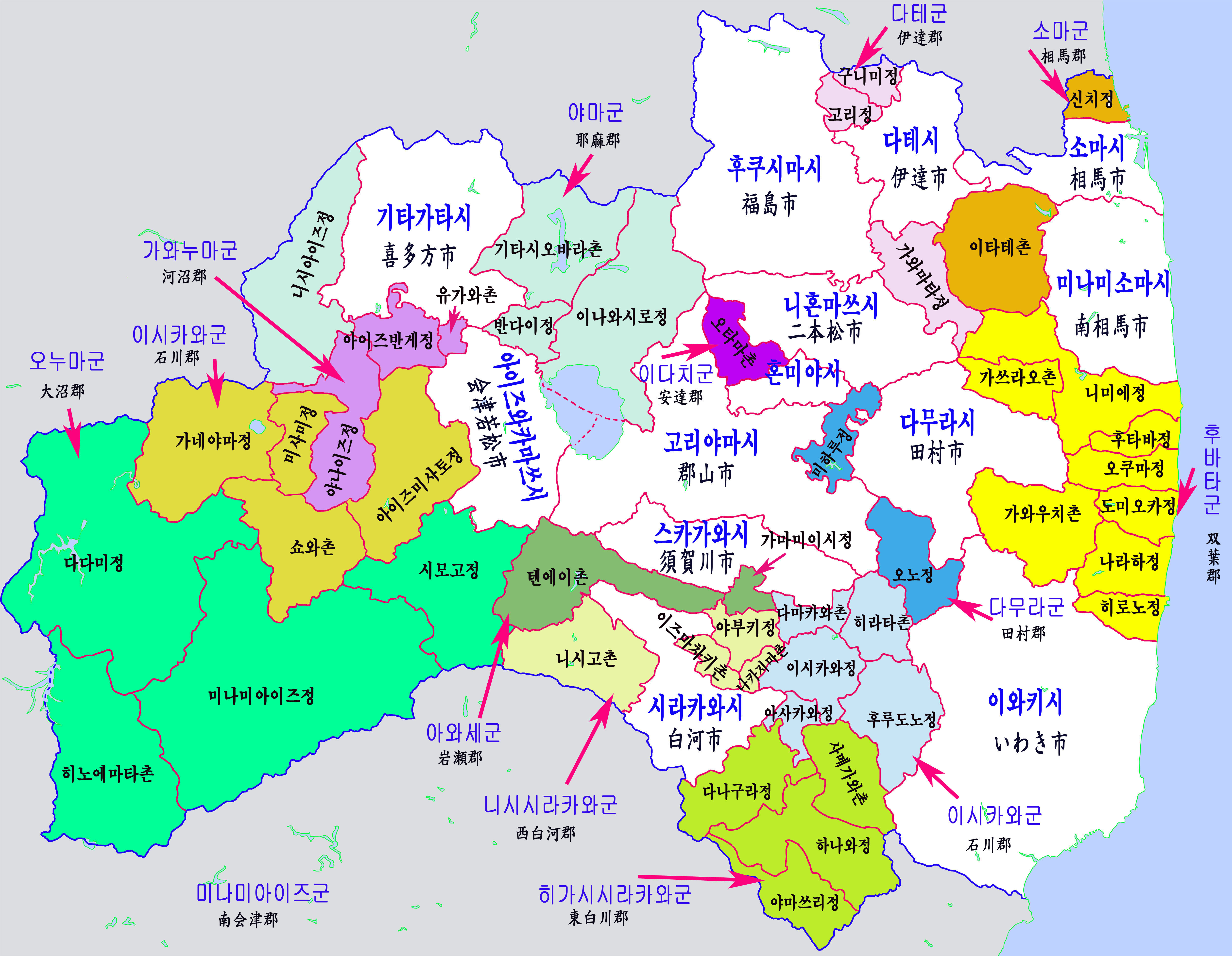 후쿠시마현지도